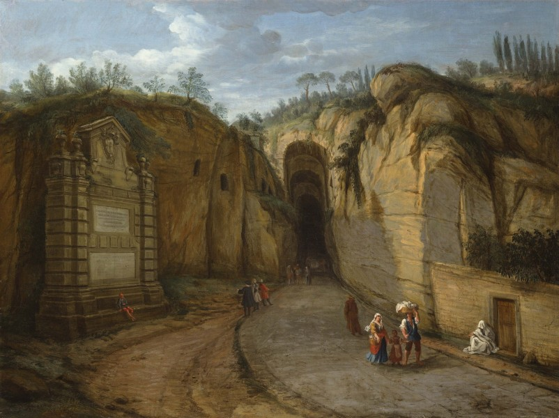 Caspar van Wittel - La Crypta Neapolitana, chiamata Grotta di Posillipo.